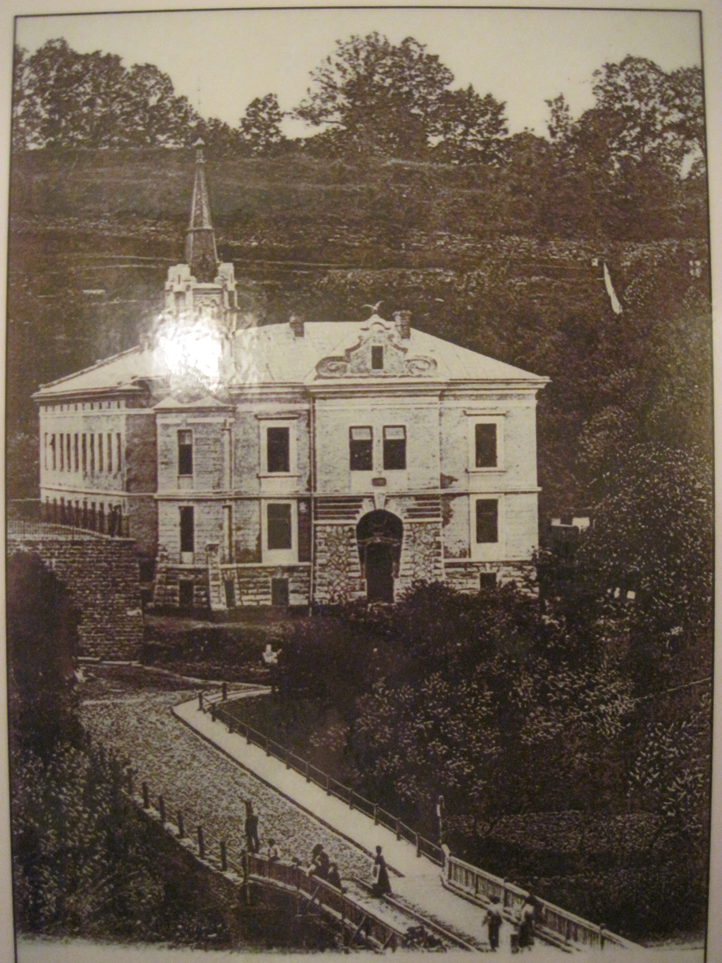 Будівля Бучацького РБК